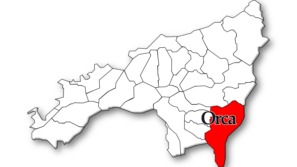 População